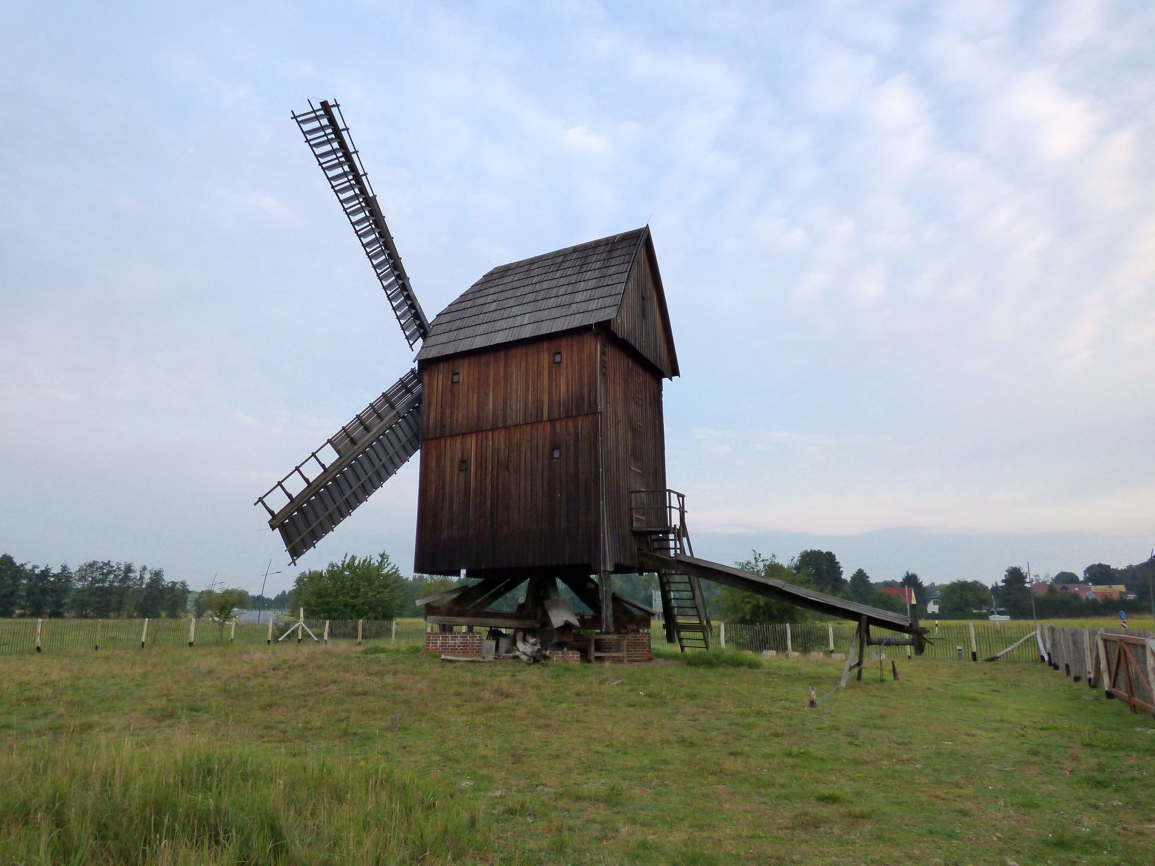 Bockwindmühle in Bad Düben, Sachsen, Deutschland, errichtet ursprünglich 1840, 2005/2006 Restauration